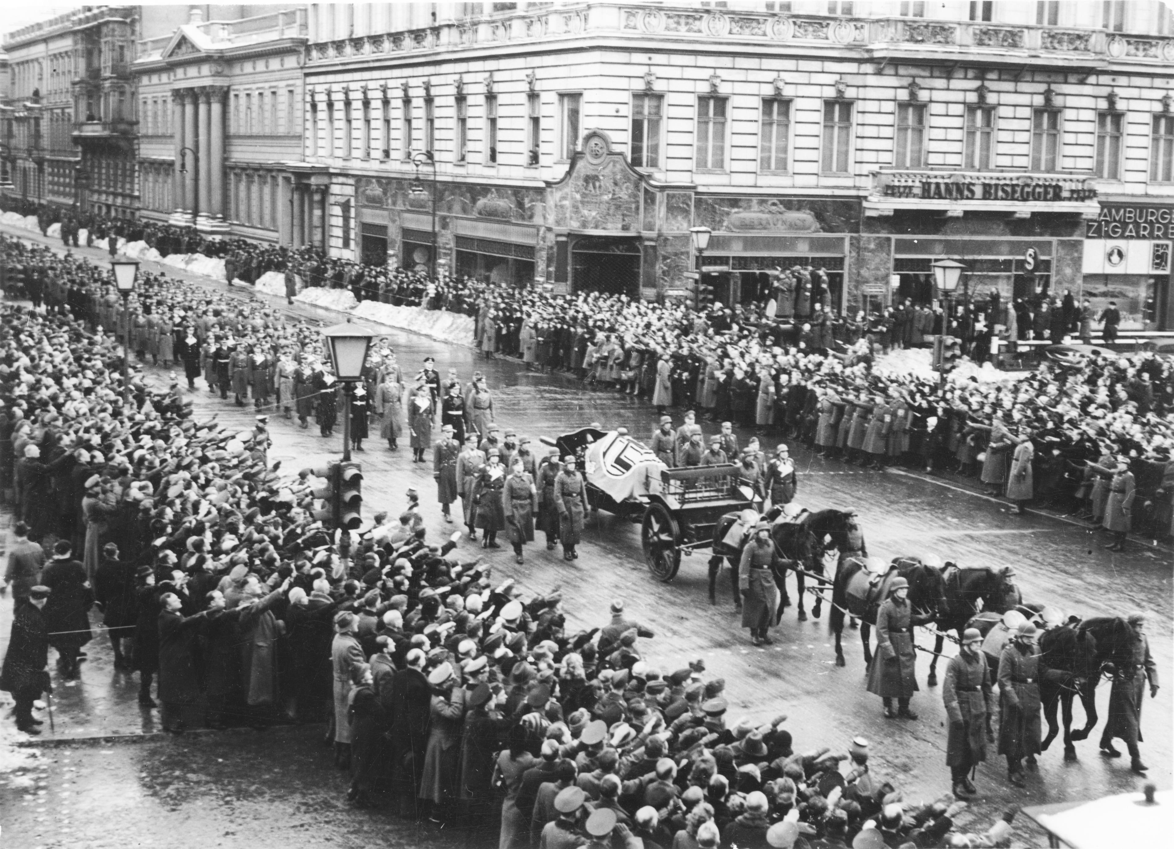 Scherl: Letzte Fahrt des Reichsministers Dr. Todt. In einem ergreifenden Staatsakt nahm der Führer und das deutsche Volk Abschied von dem genialen Reichsminister Dr. Todt. Die Spitzen des öffentlichen Lebens wohnten der Feier im Mosaik-Saal der Neuen Reichskanzlei bei. Auf dem Wege von der Neuen Reichskanzlei zum Invaliden-Friedhof stand die Bevölkerung Berlins Spalier, um Dr. Todt die letzte Ehre zu erweisen. Unser Bild zeigt den Sarg auf der Geschütz-Lafette. Er war unmittelbar gefolgt von Generalfeldmarschall Keitel, Grossadmiral Raeder und Generalfeldmarschall Milch. Dahinter folgten Reichsleiter, Reichsminister, Gauleiter, Staatssekretäre und die Generalität. Information added by Wikimedia users.